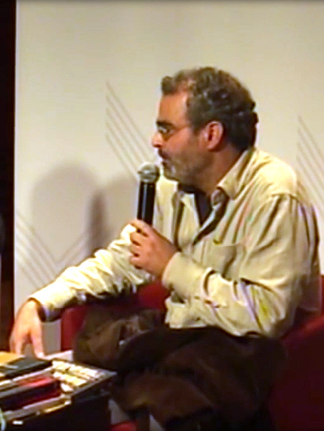 “Biblioteca à noite” de Alberto Manguel. Apresentação do livro. Apresentação de Gonçalo M. Tavares (Escritor), com a presença do autor.